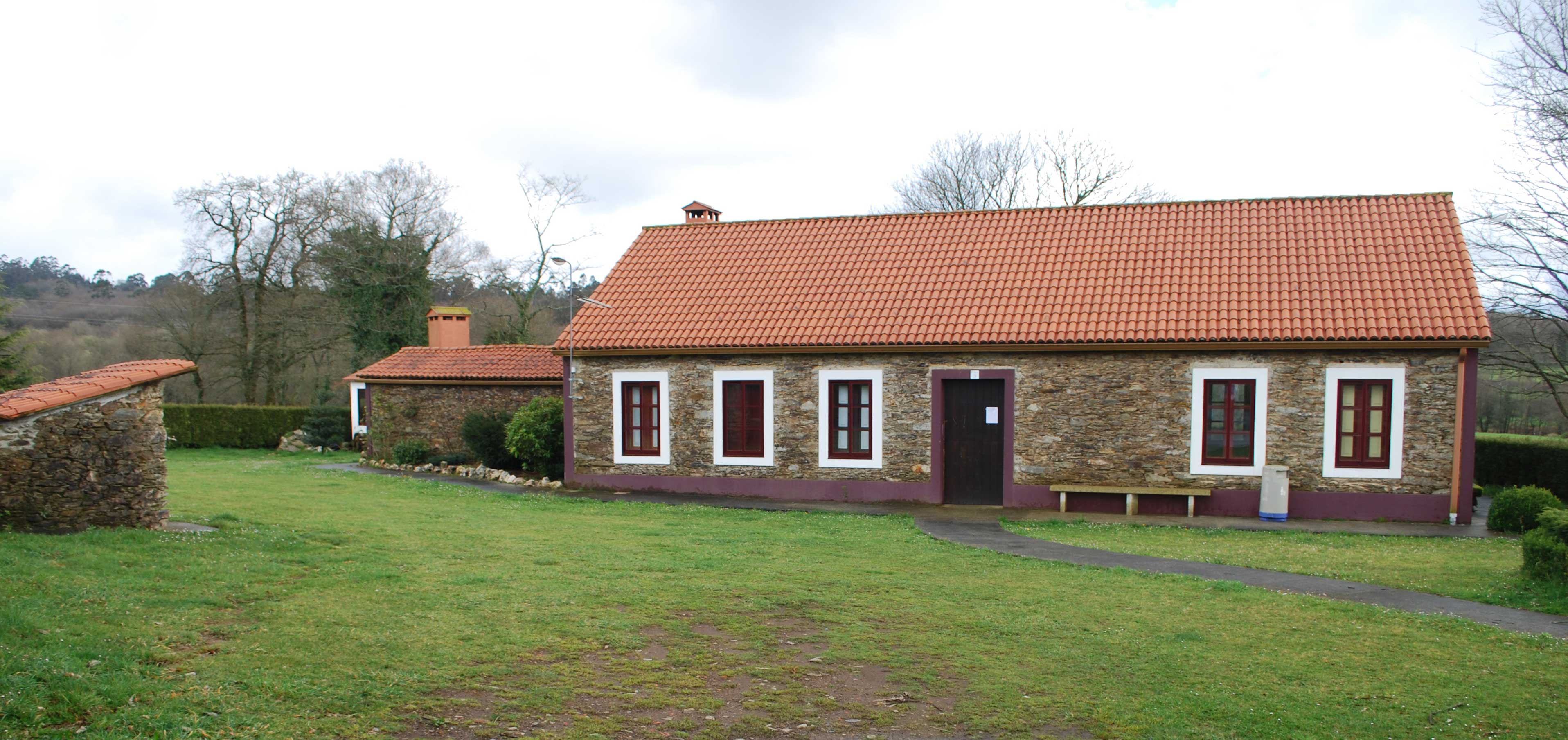 Local social de Barbeito en Vilasantar A Coruña Galiza